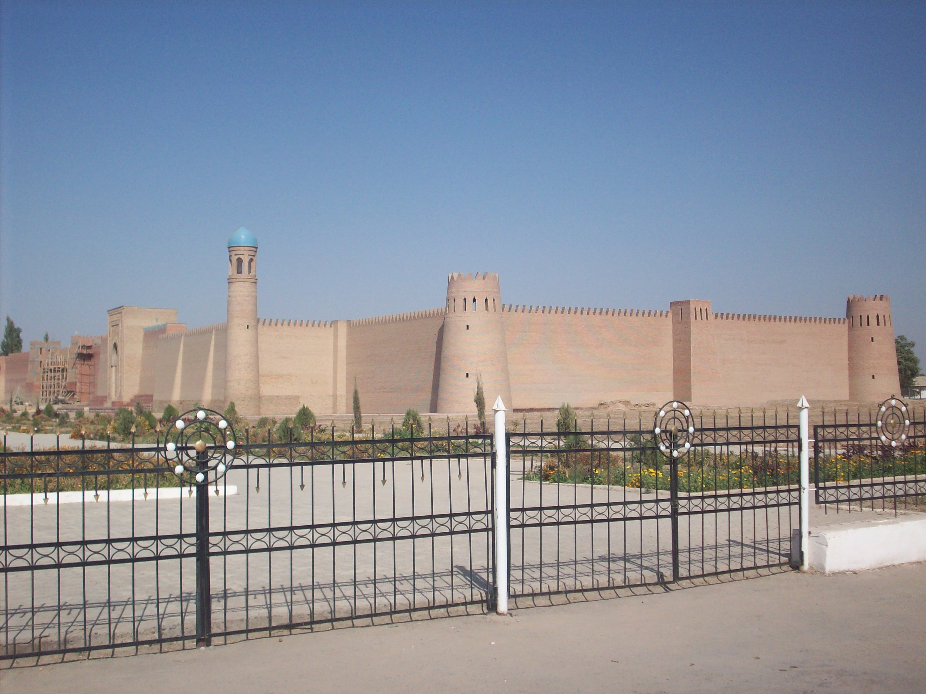 Hulbuk Fort